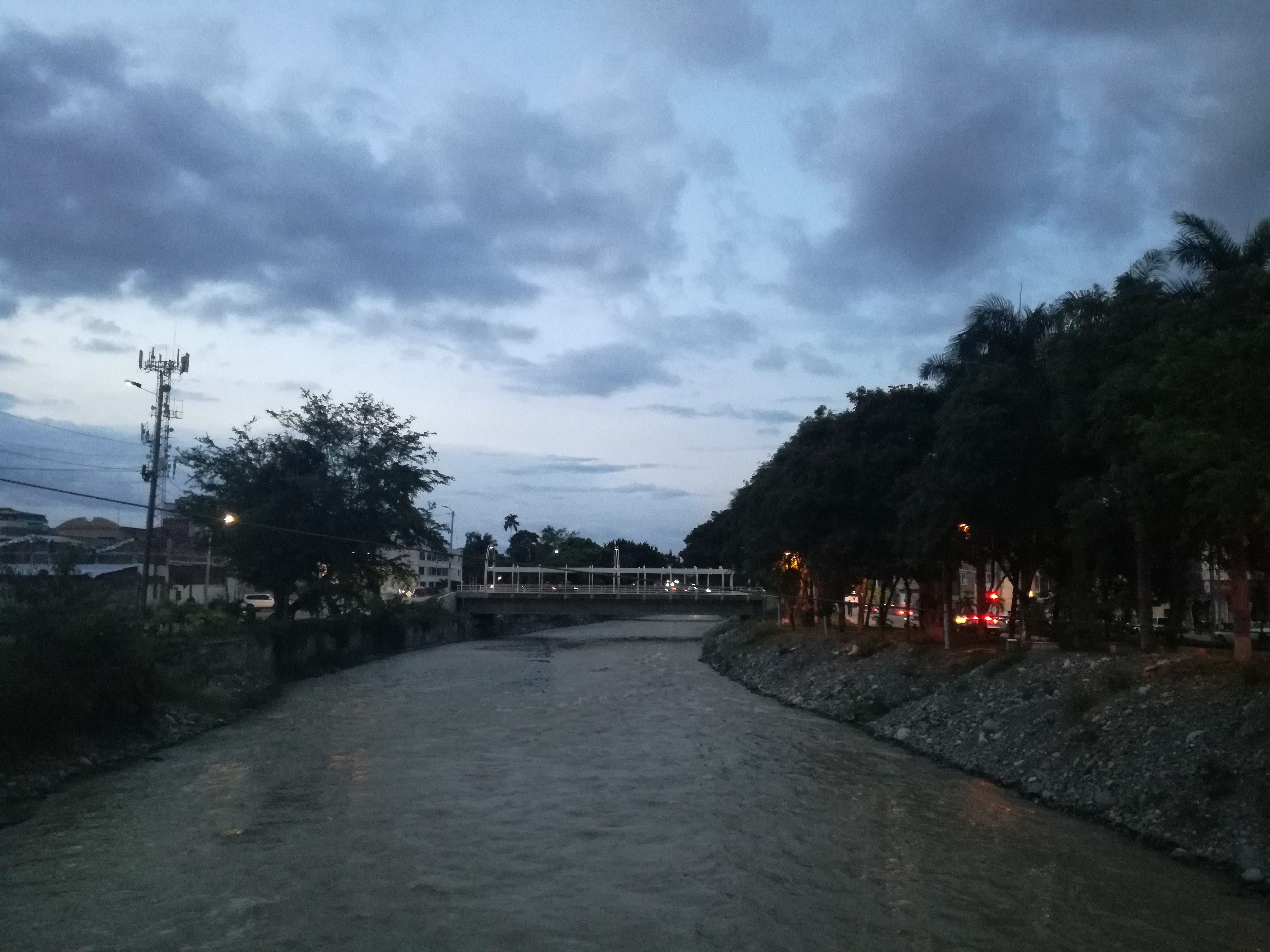 Fotografía del Río Tuluá tomada desde uno de los muchos puentes de esta ciudad